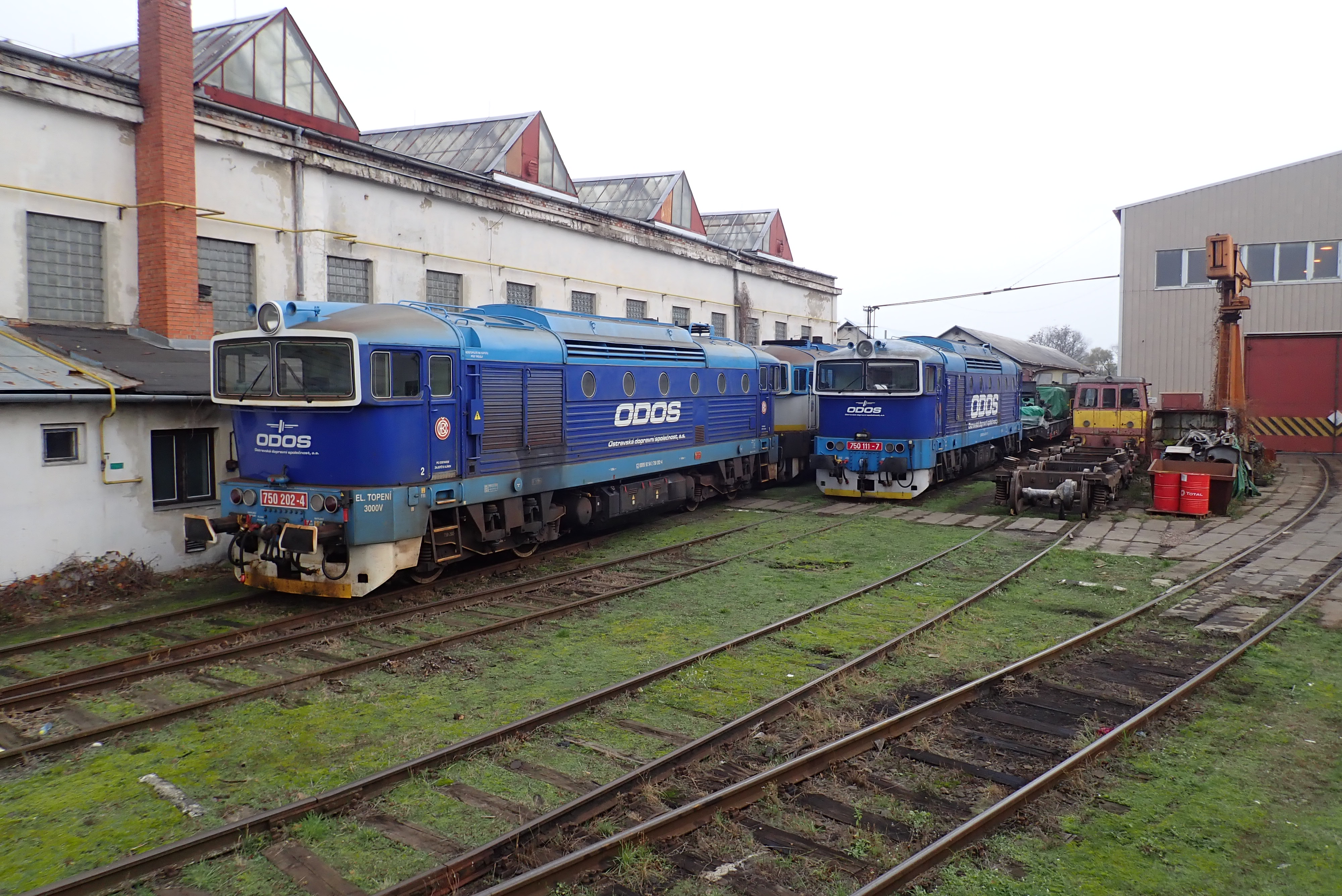 Lokomotivy řady 750 společnosti ODOS Cargo v Brně na Dolním nádraží